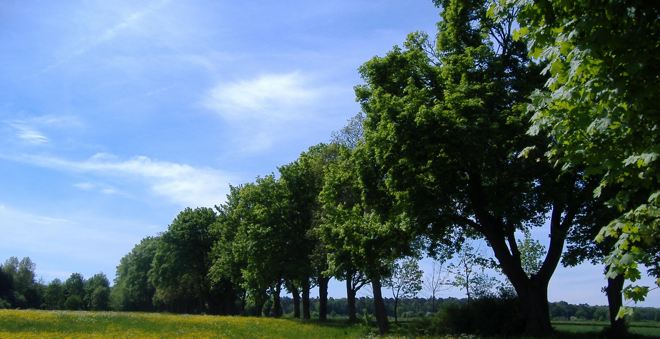 Allee Gut Rohrenfels